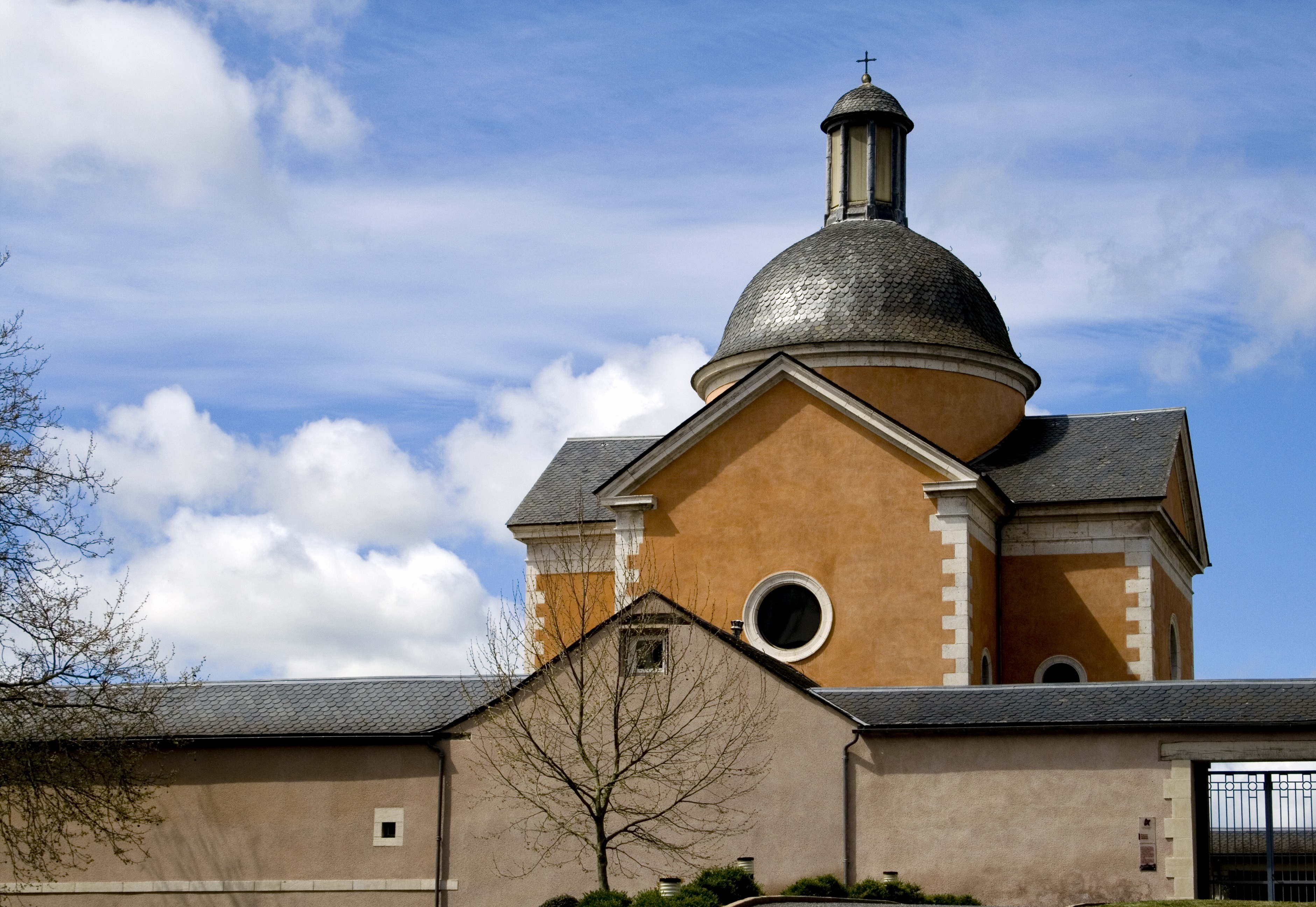 La chapelle Paraire (Rodez, France), site de l'« espace Antonin Artaud ».